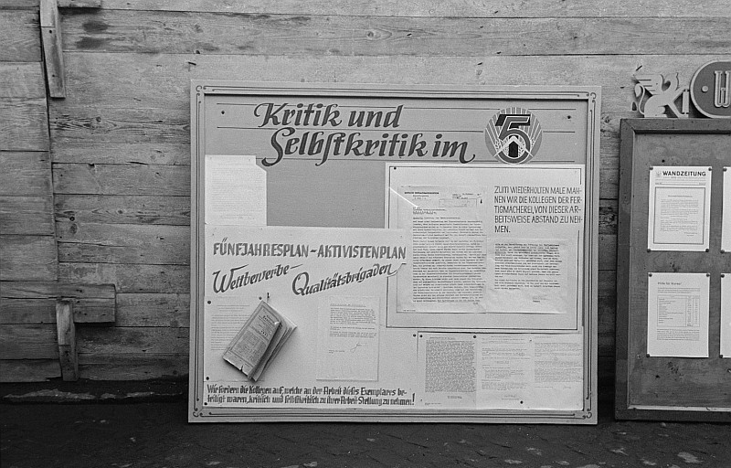 Original image description from the Deutsche Fotothek Wandzeitung der Wertpapierdruckerei Leipzig